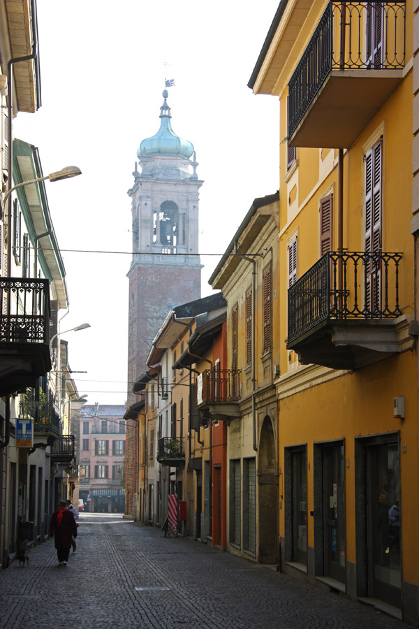 Scorcio del centro storico di Oleggio (NO), sullo sfondo la torre campanaria